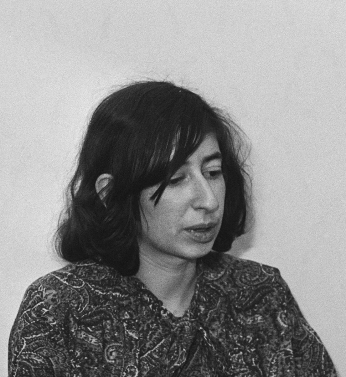 Max van Wezel met Anet Bleich, opdracht Volkskrant